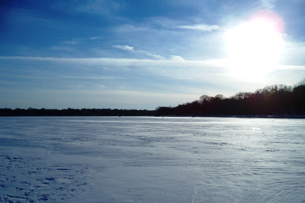 Lake Harriet, Minneapolis, Minnesota